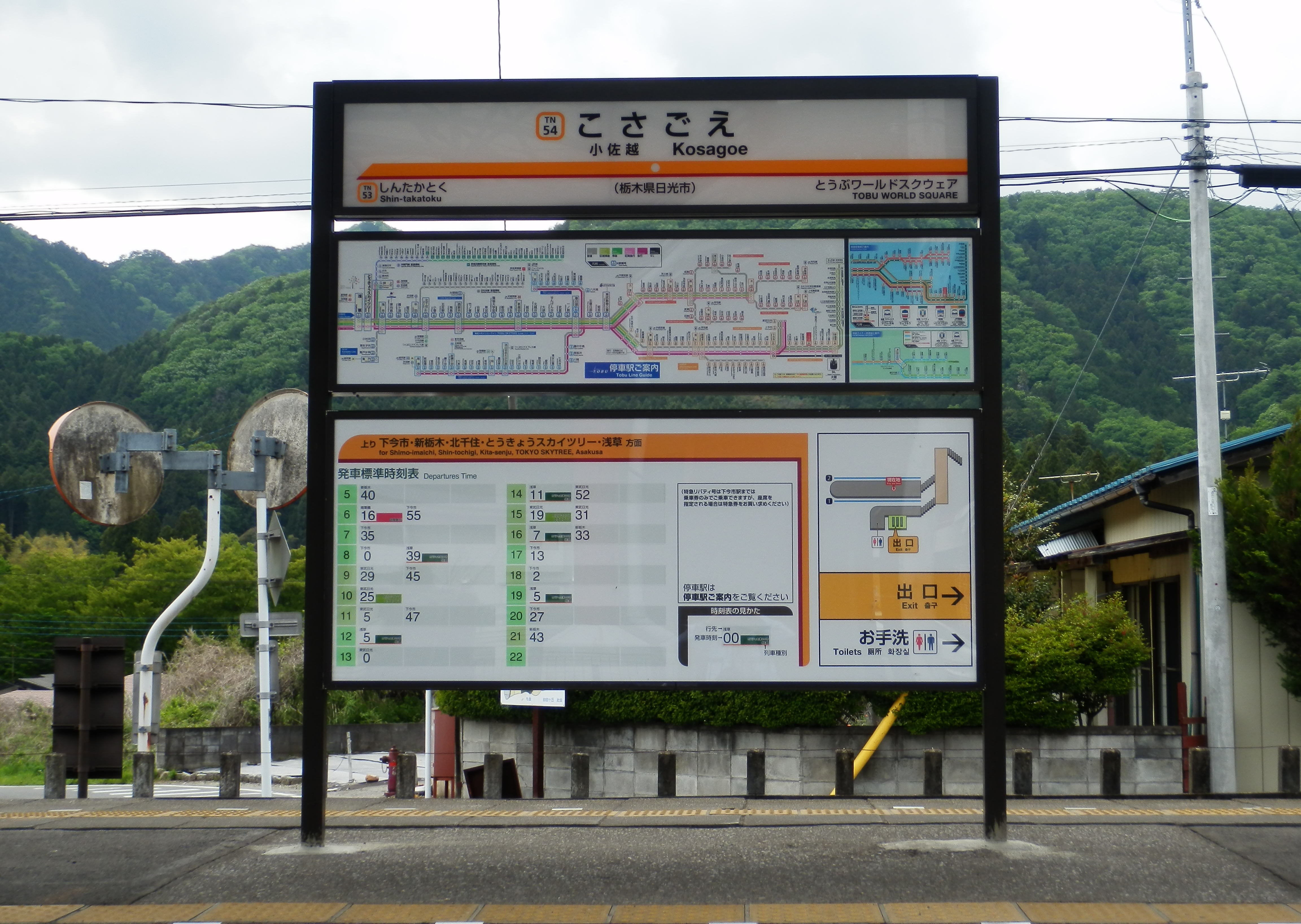 小佐越駅駅名標